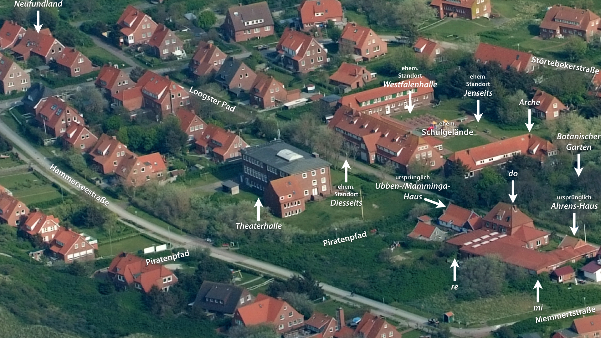 Der Ort Loog auf der Nordseeinsel Juist, Luftbildaufnahme vom 13. Mai 2012. Der Fotograf bzw. Betrachter blickt etwa in Richtung Südosten. Dieser Ausschnitt fokussiert auf das frühere Gelände der reformpädagogischen Schule am Meer, 1925 gegründet von Martin Luserke (1880–1968). Die Schule wurde im Rahmen der nationalsozialistischen Gleichschaltung im Jahr 1934 geschlossen. Das Foto zeigt die heute noch bestehenden Gebäude der früheren Schule, die seitdem allerdings modernisiert, teilweise um- und ausgebaut worden sind. Die ehemalige Arche (Unterkunft der älteren Schüler) und die Theaterhalle der Schule gehören heute zur DJH Jugendherberge Juist. Die früheren Häuser re und mi (Naturkunde-Lehrmittelsammlung und Meerwasseraquarium) beherbergen heute das Küstenmuseum Juist. Das Mamminga-Haus (Lehrer-Wohnungen), do (Lehrer-Wohnungen) und Neufundland (Unterkunft der jüngsten Schüler) werden heute privat genutzt. Auf dem Foto wird zudem auf die ehemaligen Standorte von Gebäuden hingewiesen, die abgerissen worden sind: Diesseits († 1952), Jenseits († 1952) und Westfalenhalle († 1960). Die allermeisten übrigen Gebäude, die auf dem Foto zu erkennen sind, bestanden zu Schulzeiten noch nicht. Der heute insgesamt üppige Baumbestand war damals noch nicht vorhanden, es gab auch noch keine befestigten Straßen.